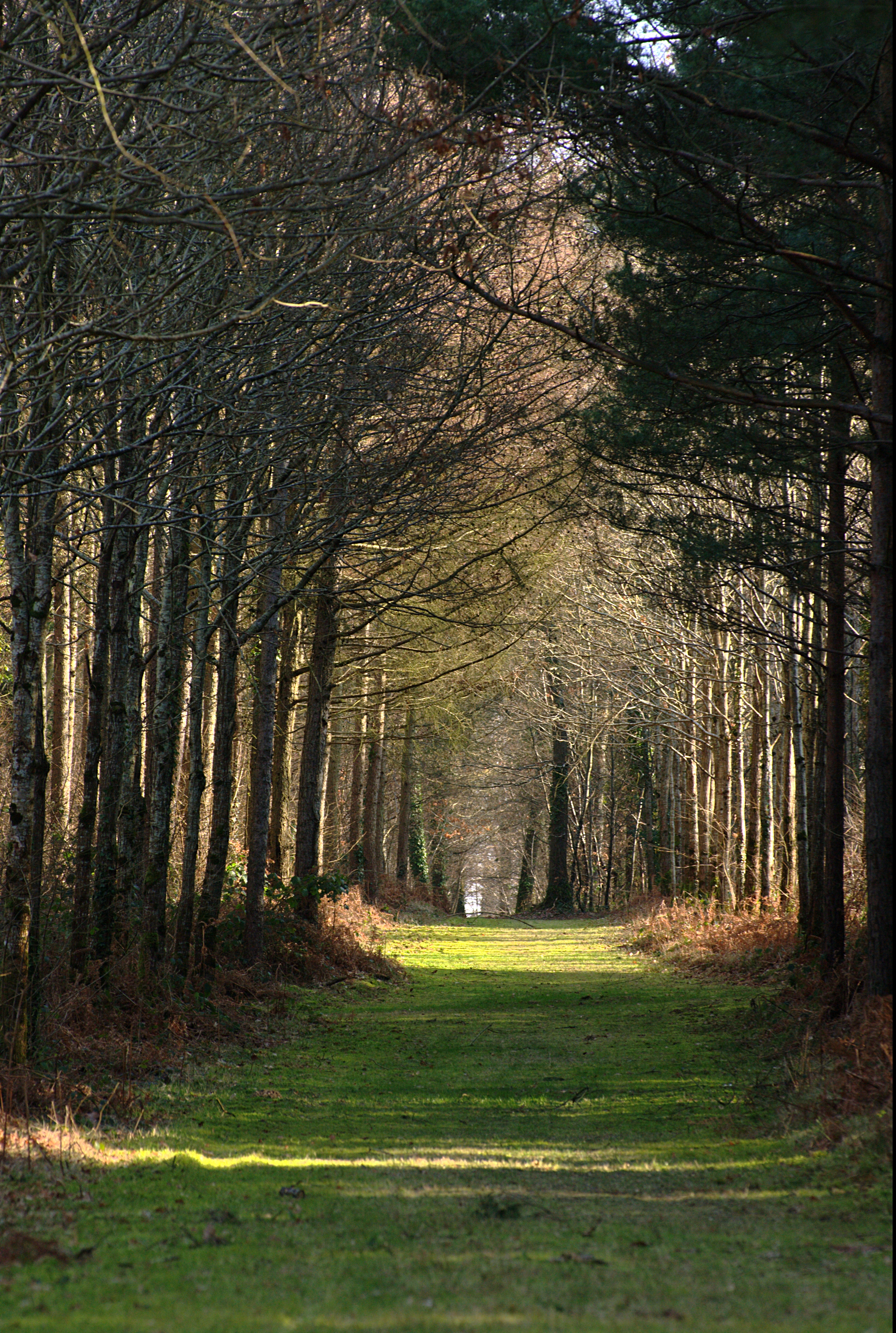 Sentier dans la Forêt de Grimbosq.